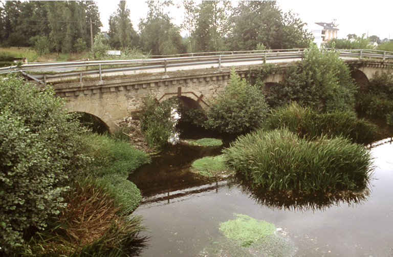 A Ponte Vella de Sarria